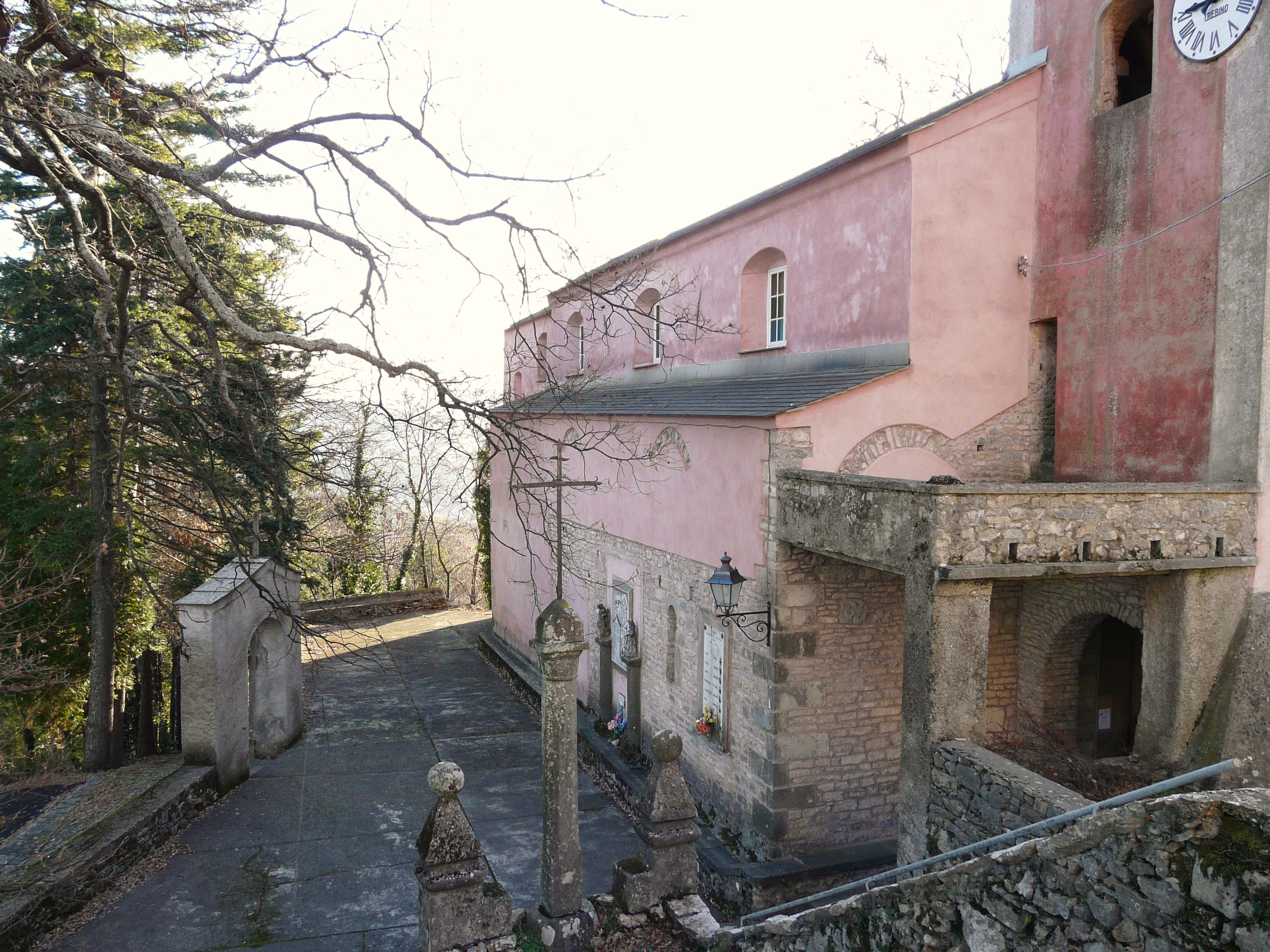 Chiesa di San Cristoforo, Ponzò, Riccò del Golfo di Spezia, Liguria, Italia